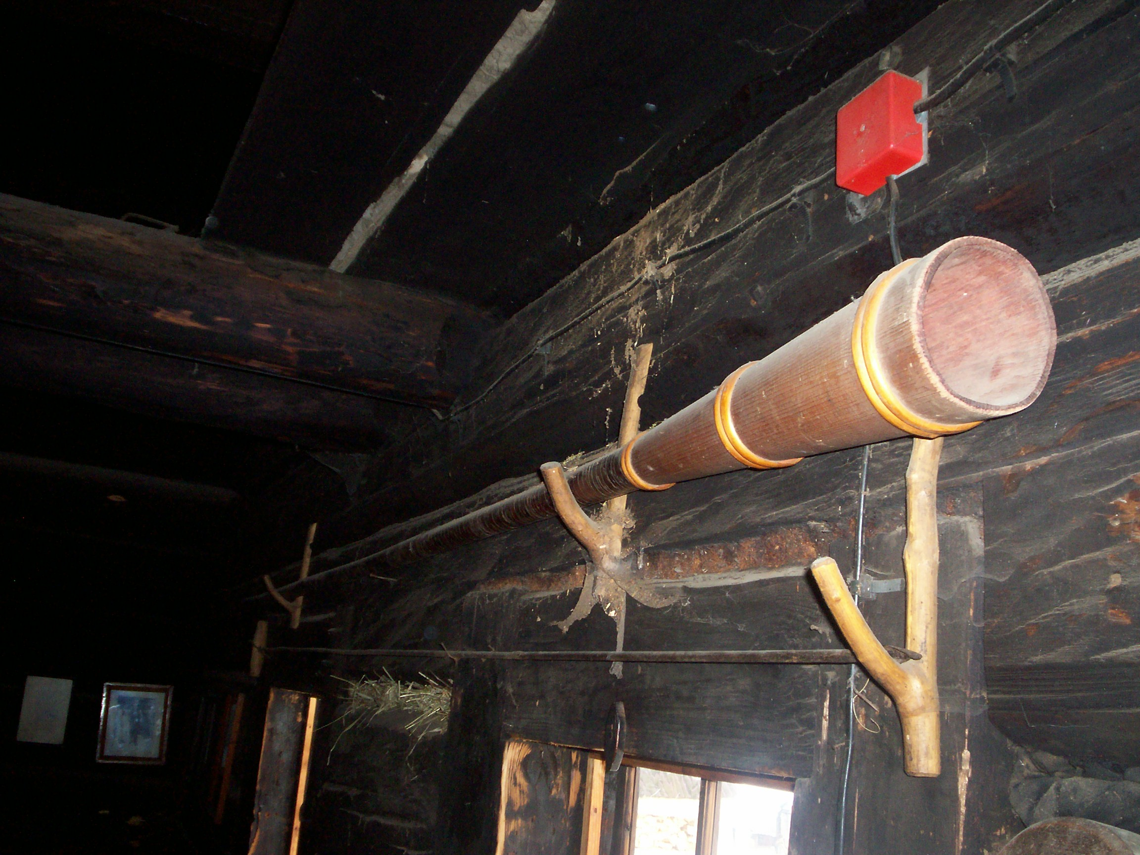 Istebna, Kurna Chata Kawuloka.